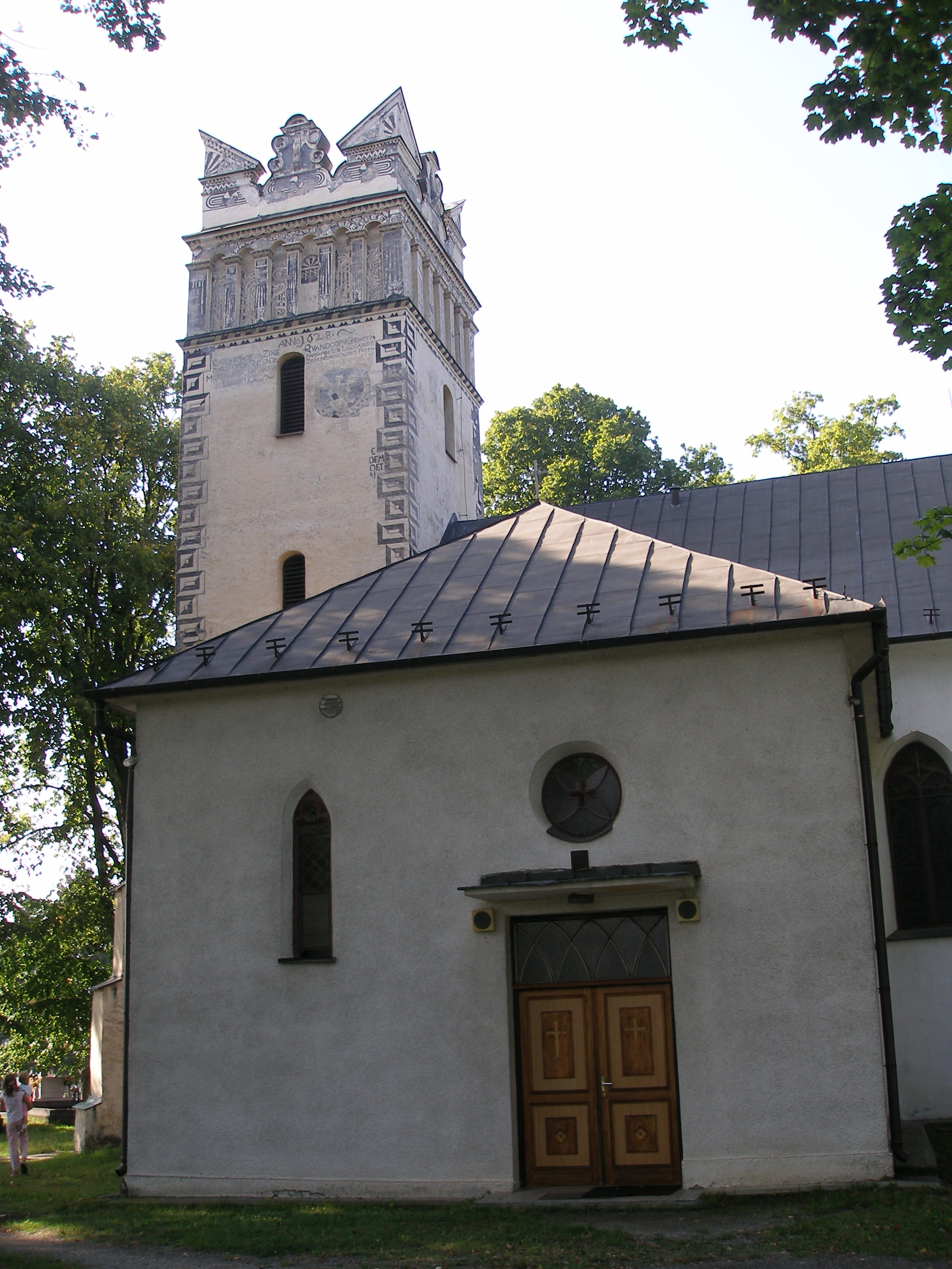 Obec Svinia okr.Prešov, región Šariš